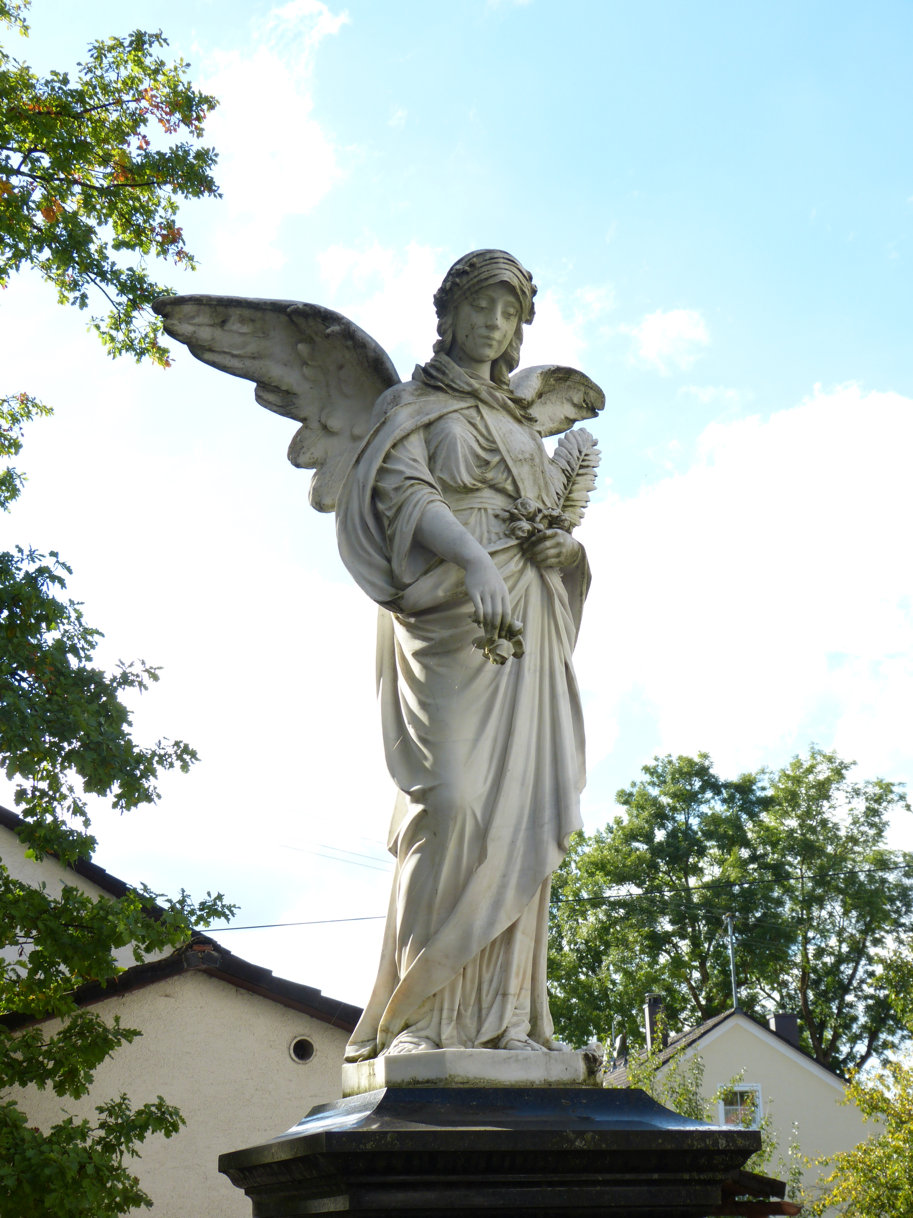 St. Peter und Paul in Erkheim, Landkreis Unterallgäu, Bayern